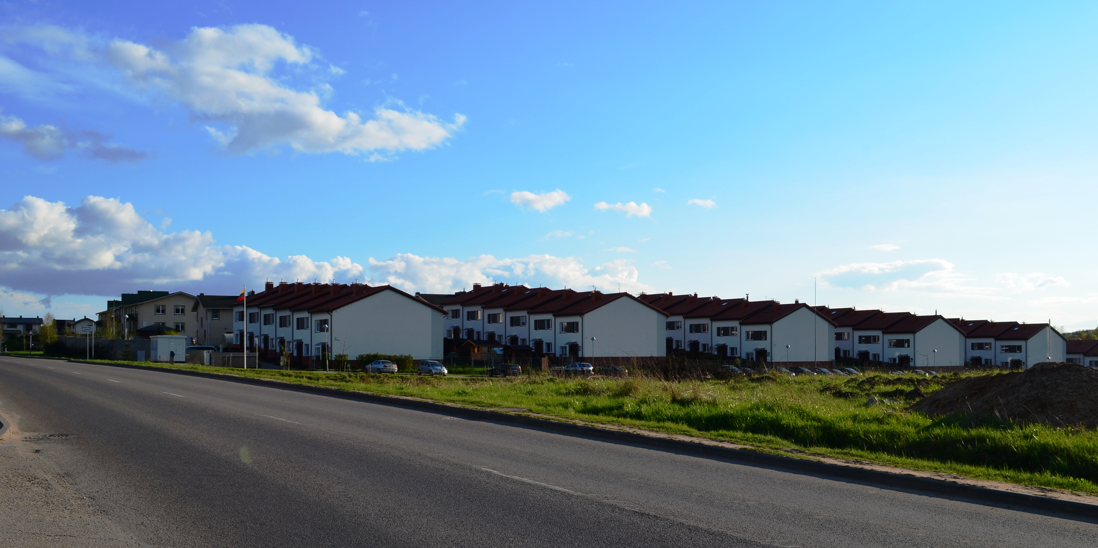 Klevinė, Vilniaus raj.